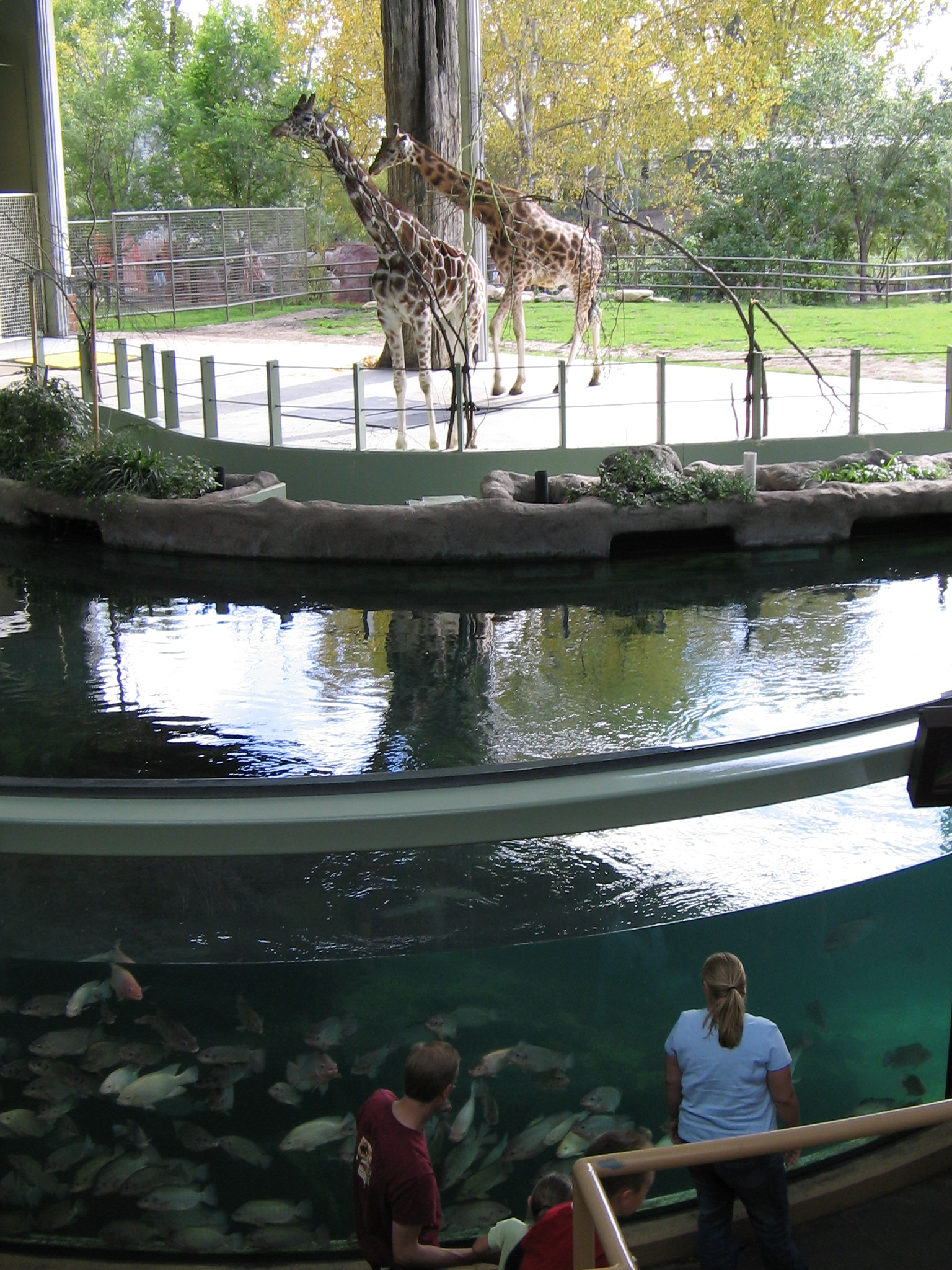 Bildo en la ekspoziciejo "African Savannah" de la Kalgaria Zoo. Fone estas ĝirafoj, malfone la hipopotama naĝejo kun fiŝoj. Somero 2005. Fotis Paul Hopkins.